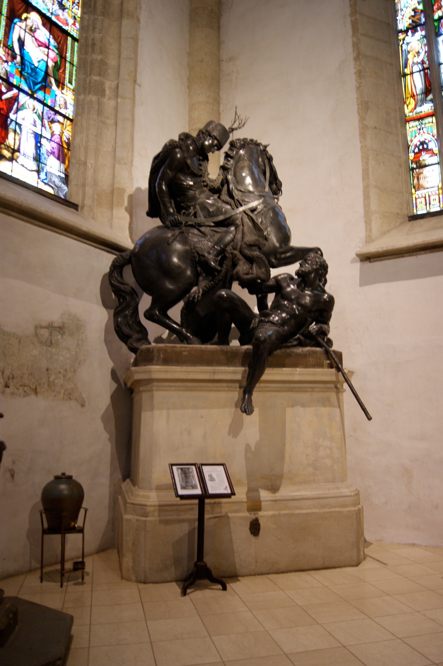 Werk von Georg Raphael Donner (1735)